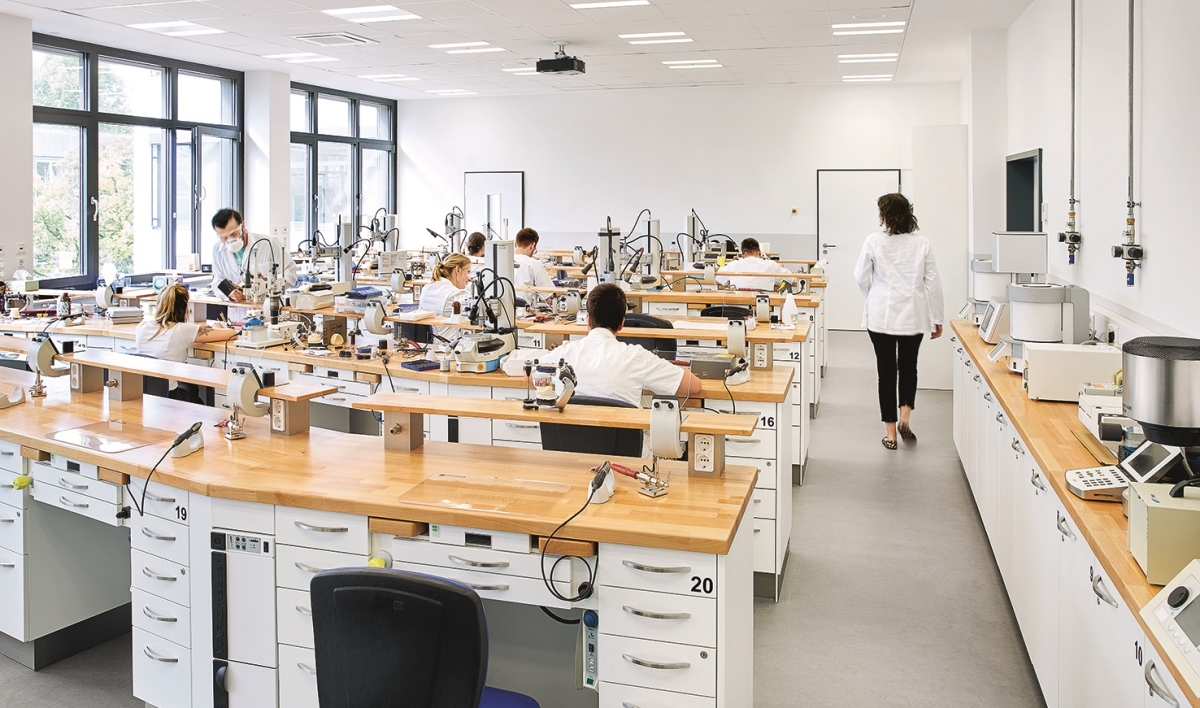 Das Zahntechniklabor mit moderner technischer Ausstatttung.